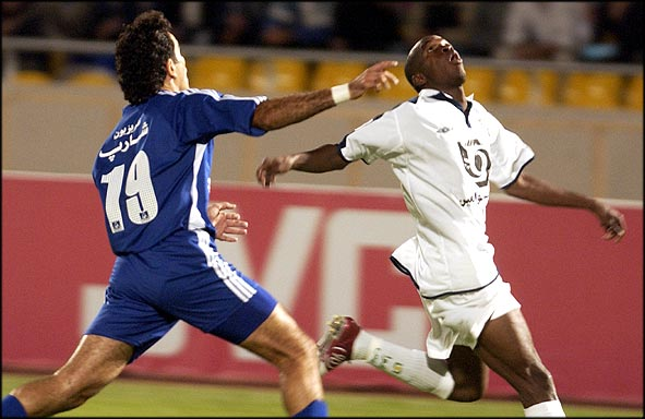 استقلال با دوگل سامره به پرسپولیس سلام كرد